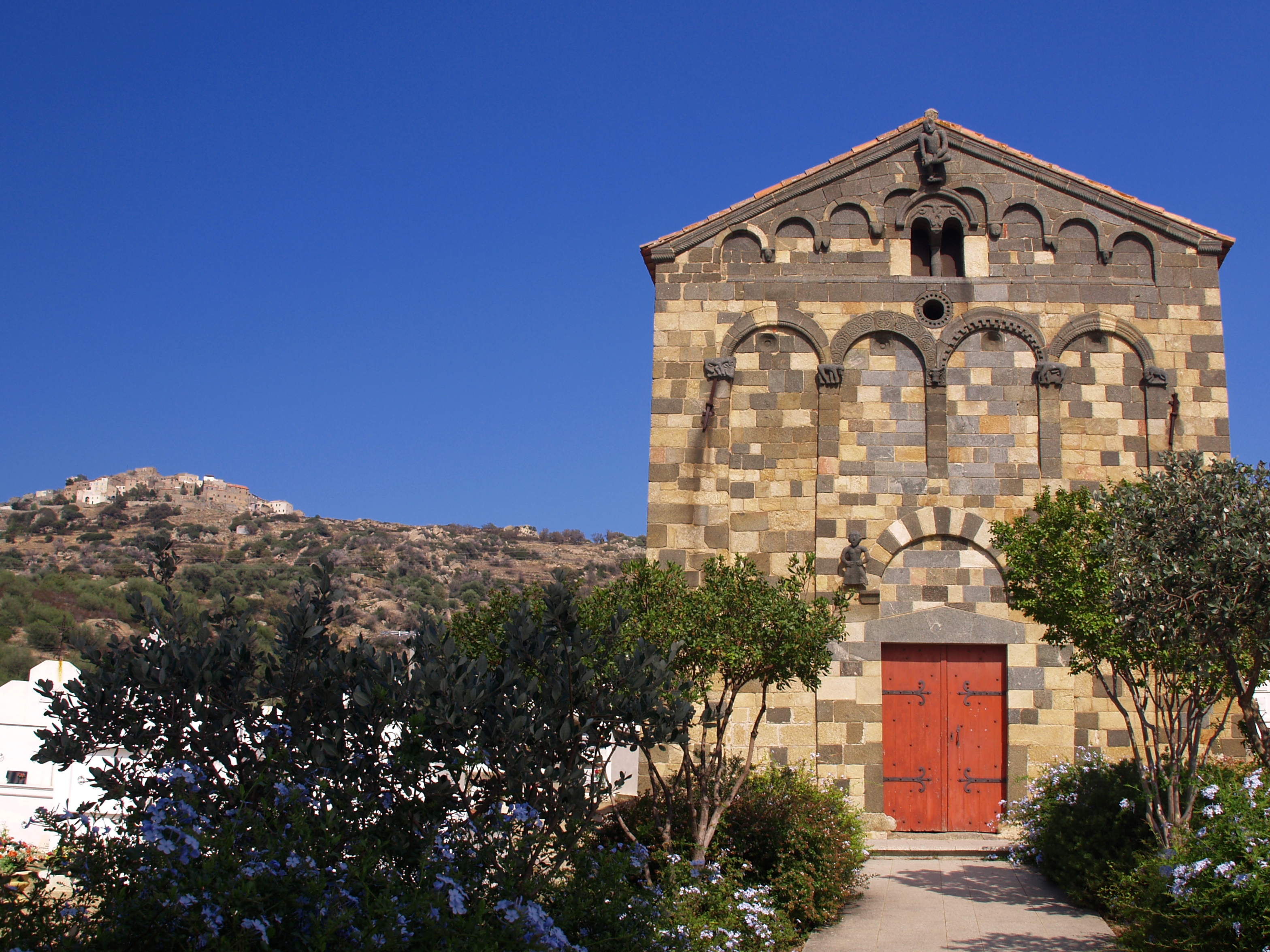 Aregno - Eglise de la Trinité et de San Giovanni